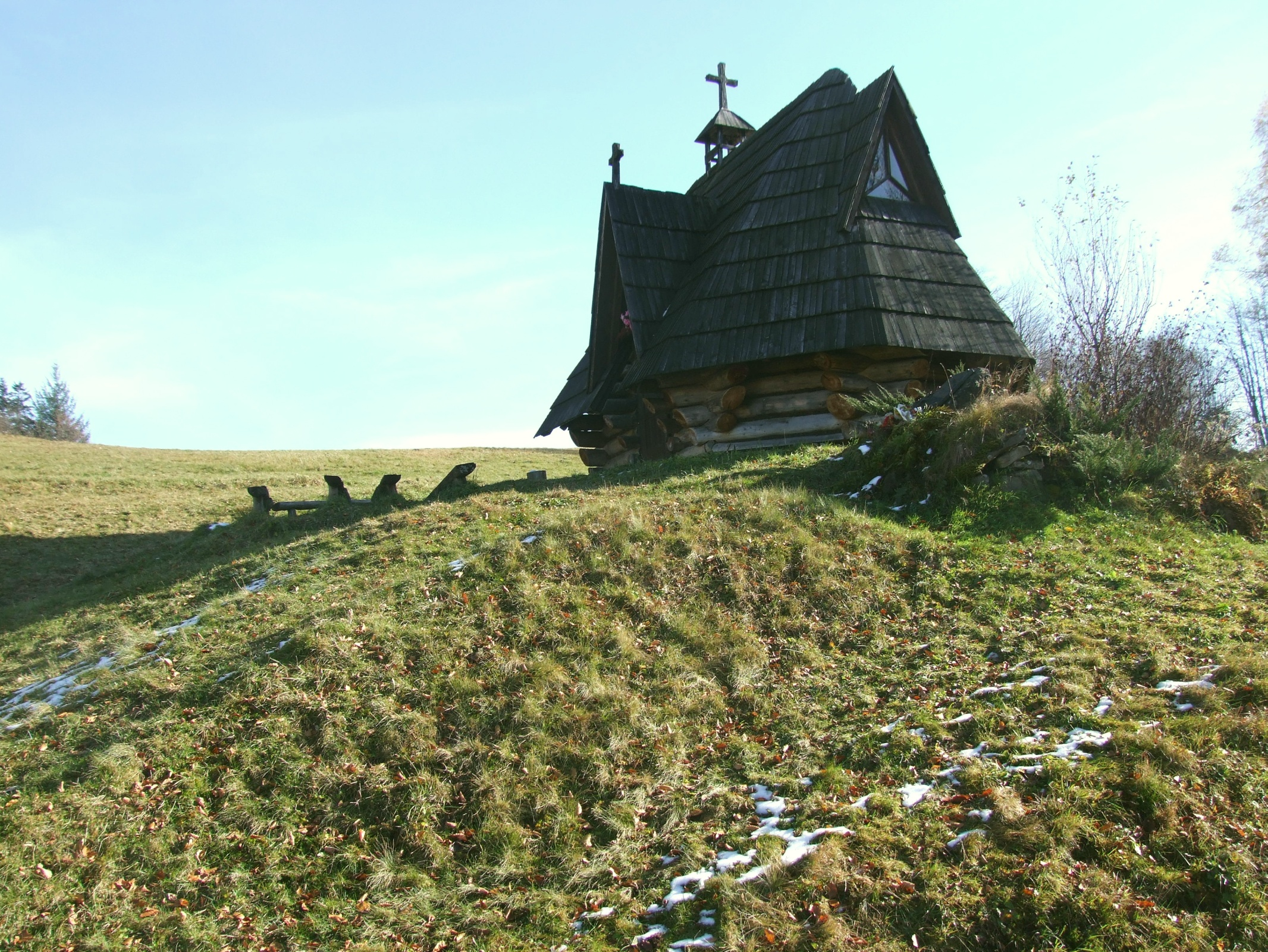 Kaplica na Przysłopie w Paśmie Radziejowej w Beskidzie Sądeckim